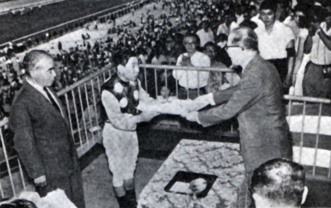 尾形藤吉と保田隆芳